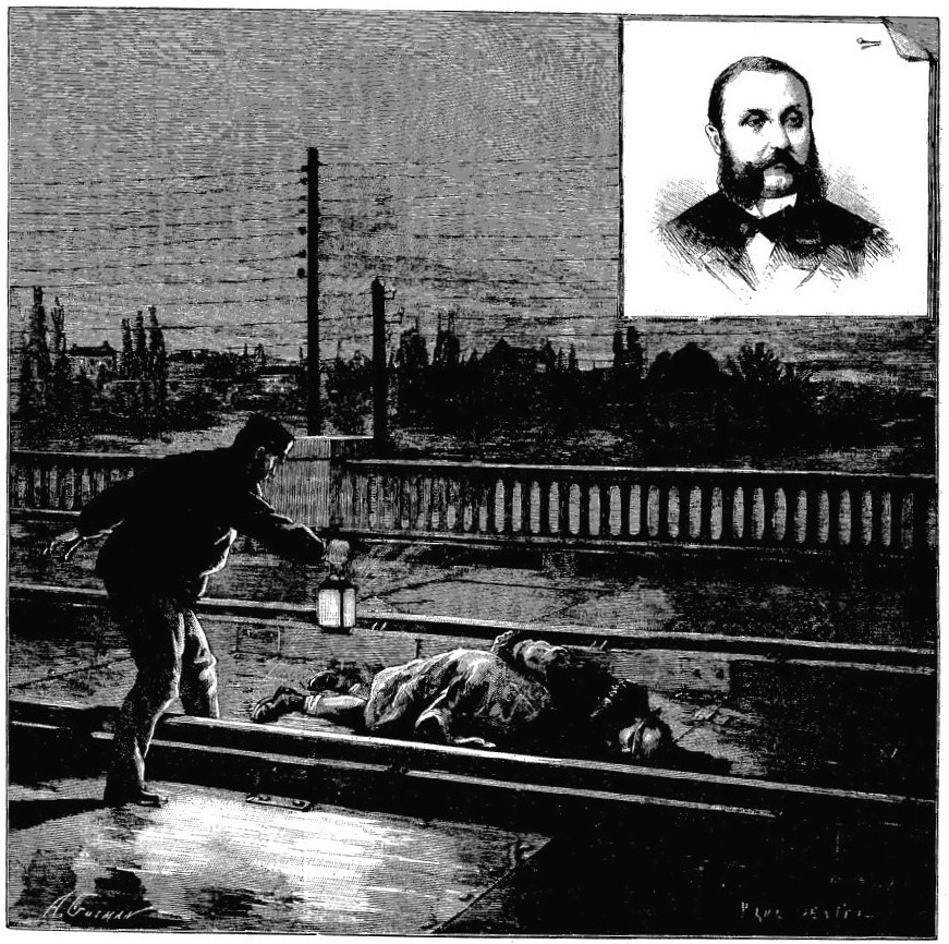 "Le drame de Maisons-Laffitte".